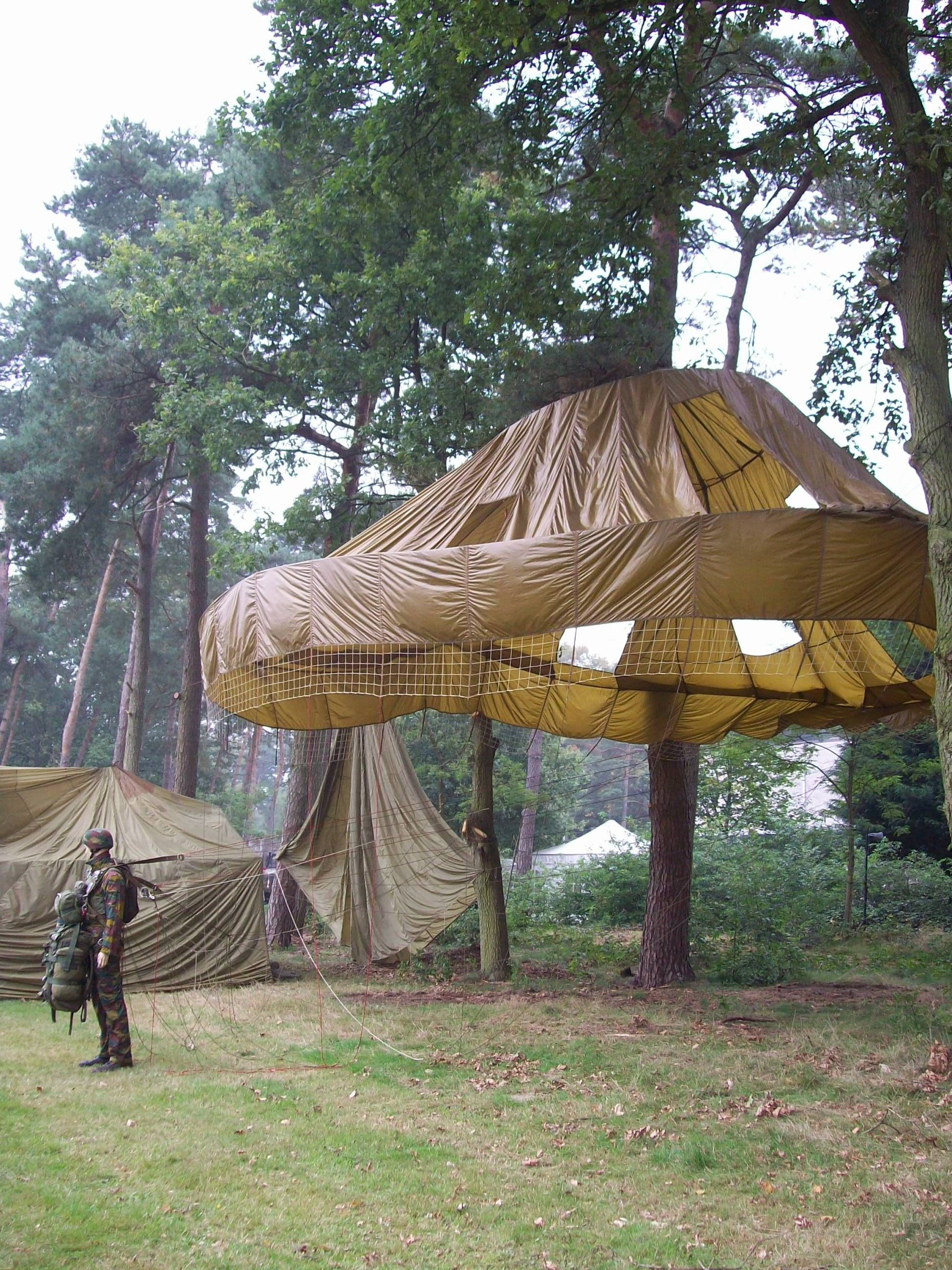 parachute automatique moderne